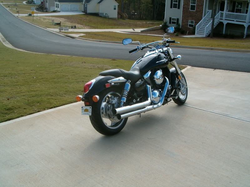 Кавасаки Минстрик 2006